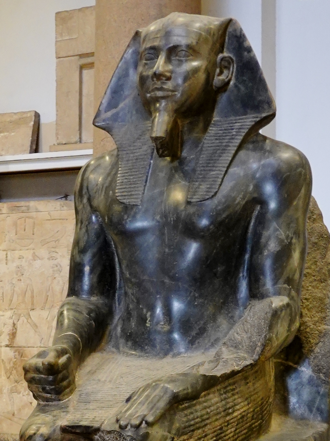 Sitzstatue des Königs Chephren der 4. altägyptischen Dynastie, ausgestellt im Ägyptischen Museum in Kairo, Ägypten